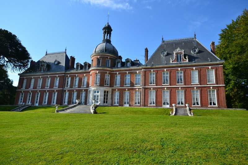 Château du Landin